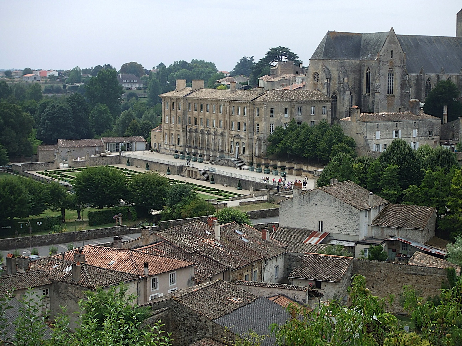 Abbaye royale Notre-Dame et le jardin à la française, ville de Celles sur Belle, département des Deux-Sèvres, France